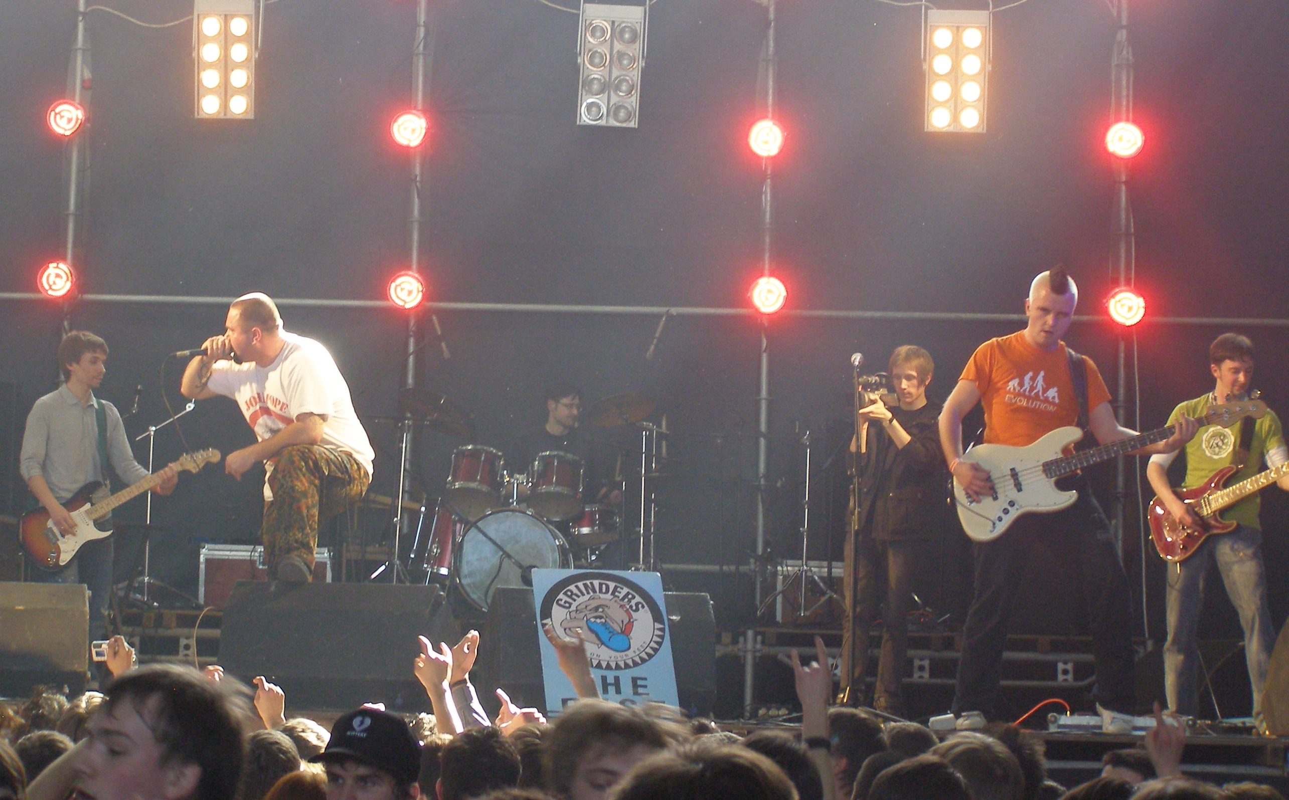 Toster - ukrainische Rockband